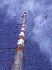 En av masterna vid Östersunds Radiostation med FM-antenner i toppen kort före rivning.